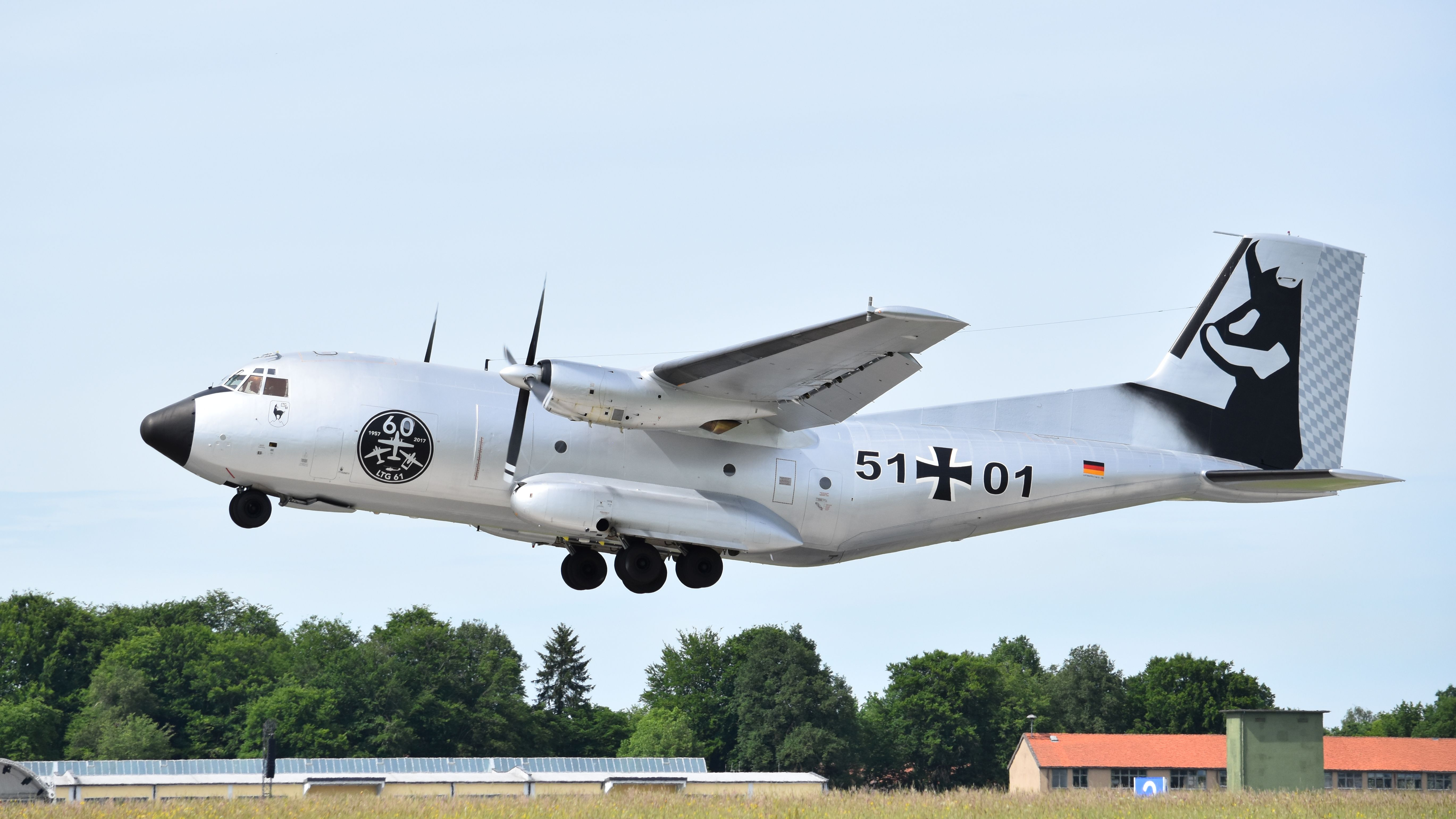 Transall C-160 beim Start am Fliegerhorst Landsberg/Lech am "Spotterday 2017"